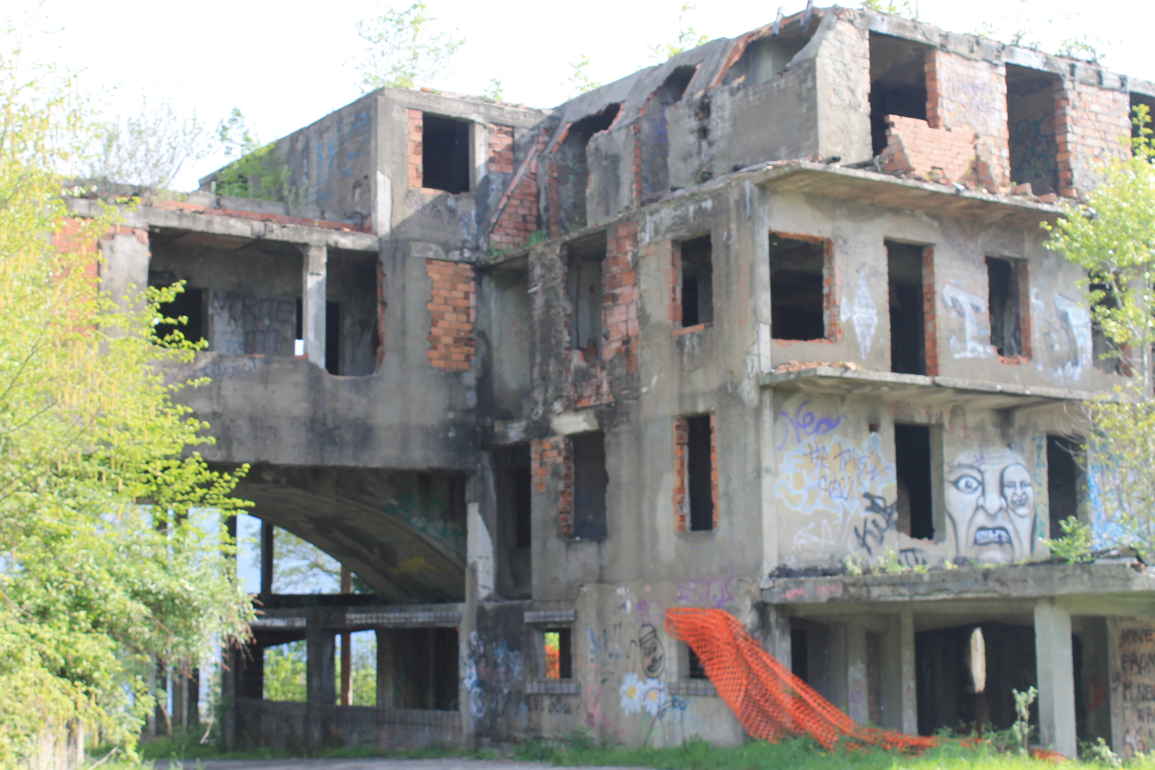 Edificio